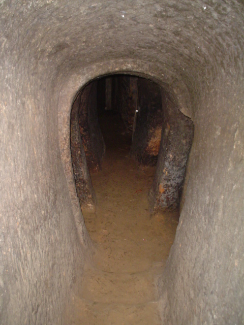 Entrada a cada uno de los habitáculos que divide la galeria de las bodegas.